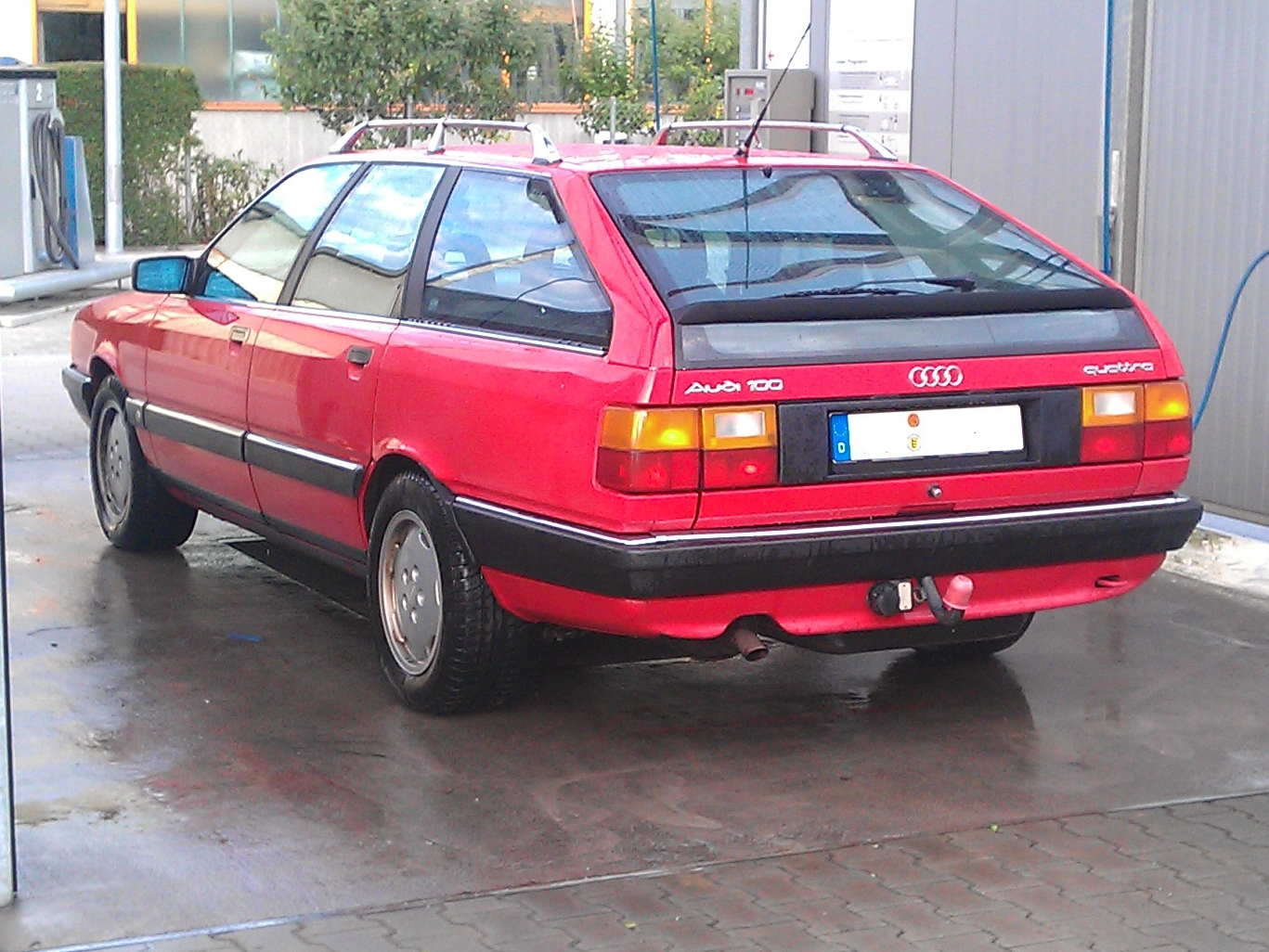 1990 Audi 100 Avant quattro "Sport" 2.3 E NF/AAT/AML/LY3D/834/NX, Modell 445PH5 + S711, KBA 0588/485